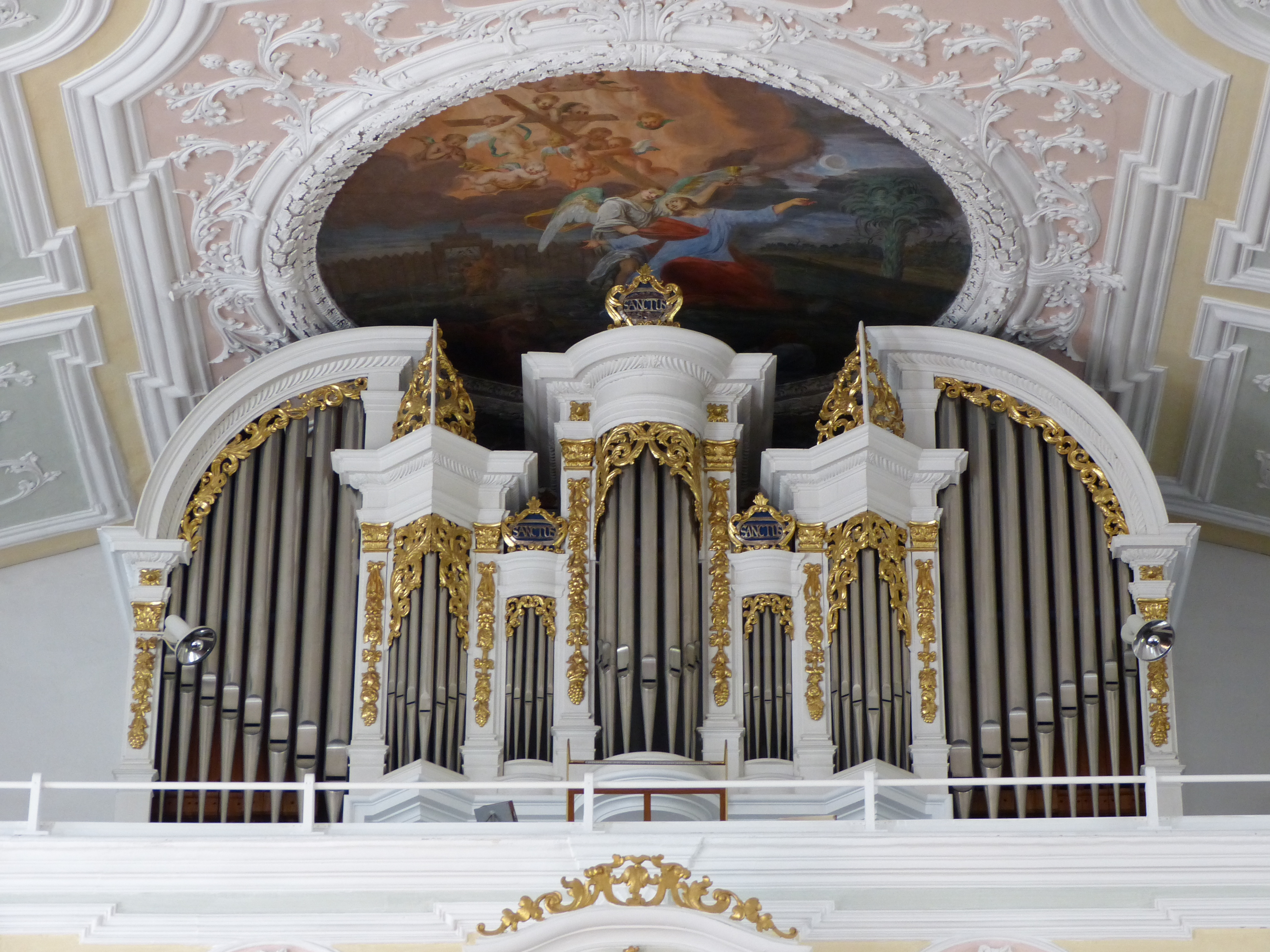 St. Martin in Boos, Landkreis Unterallgäu, Bayern